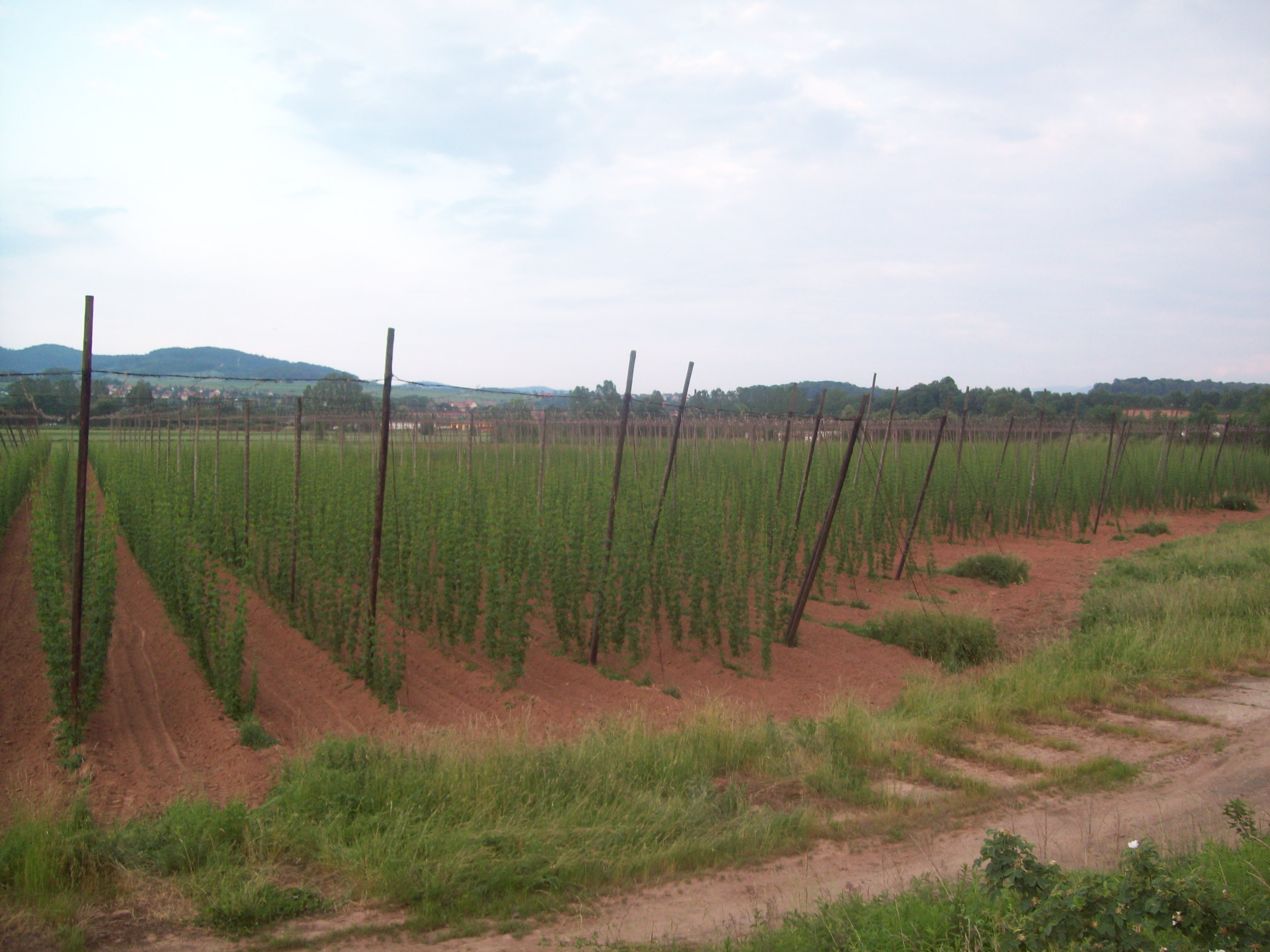 Chmielnik w Kłodzku